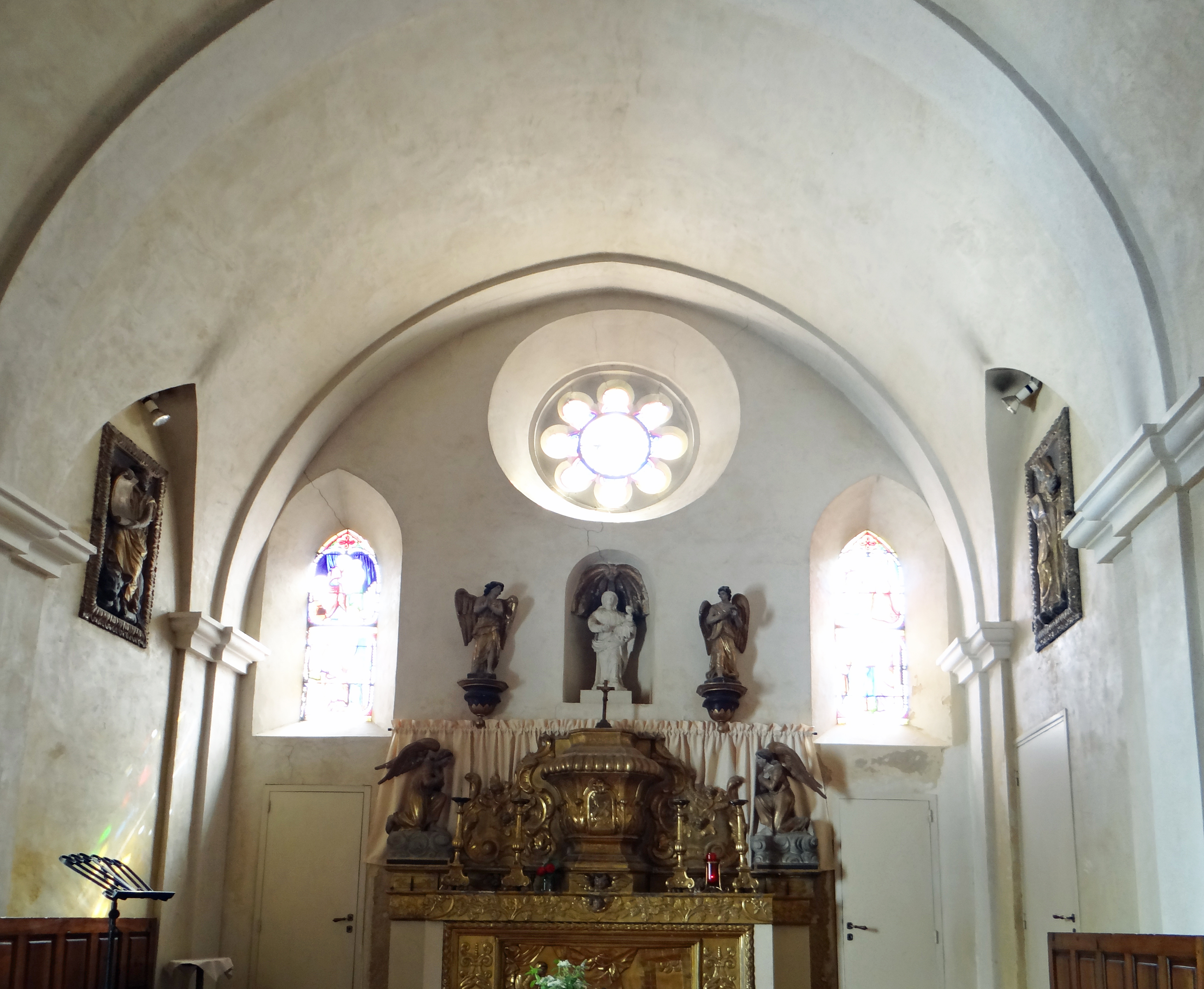 Gourdon - Chapelle Notre-Dame du Majou - Nef et autel